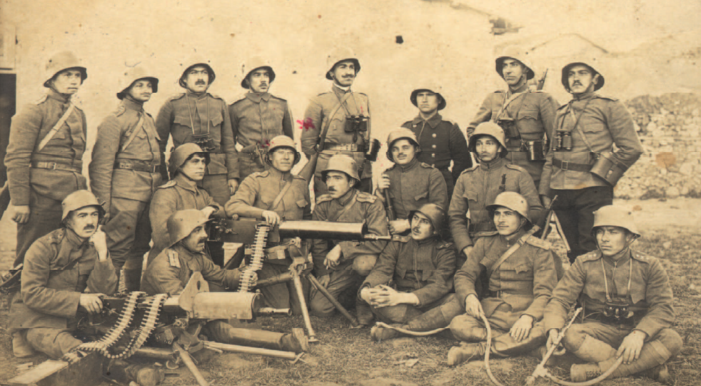 Капитан Стафанов с офицерите от Картечното училище при I-ва армия, фронтът, 1918 г.